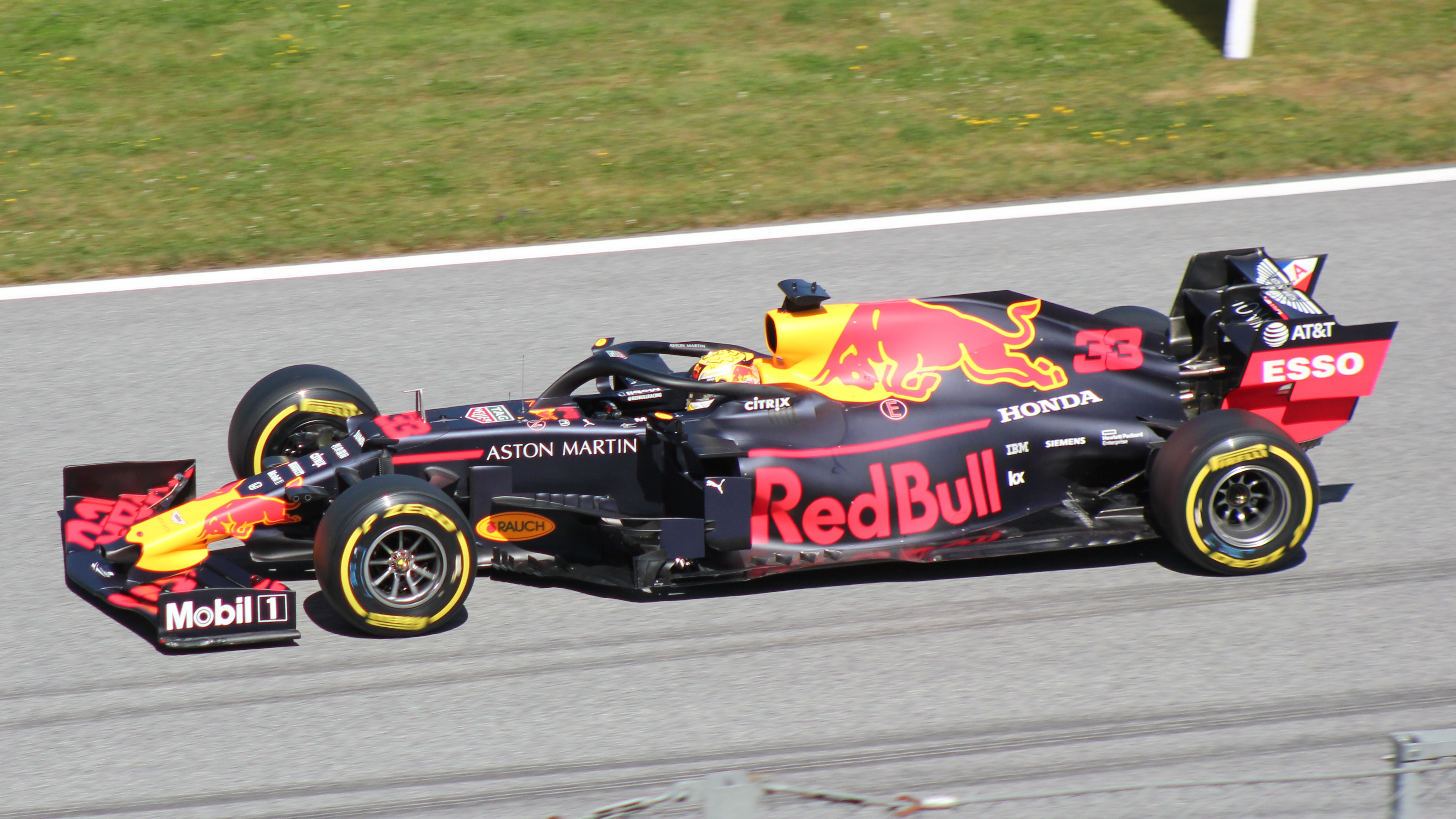 Verstappen beim Rennwochenende in Österreich 2019